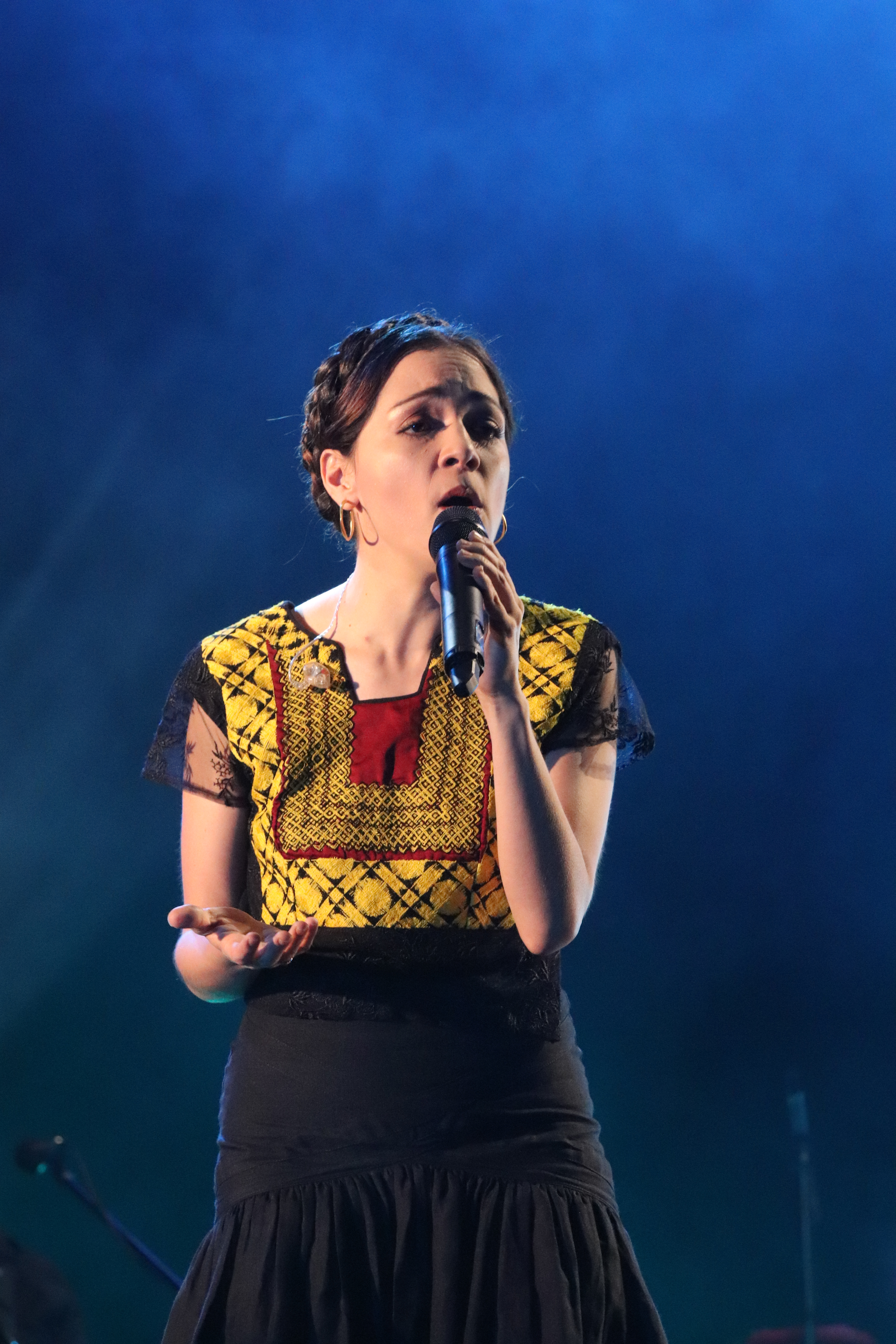 Recital de Natalia Lafourcade el 26 de Abril de 2018 en el Gran Rex